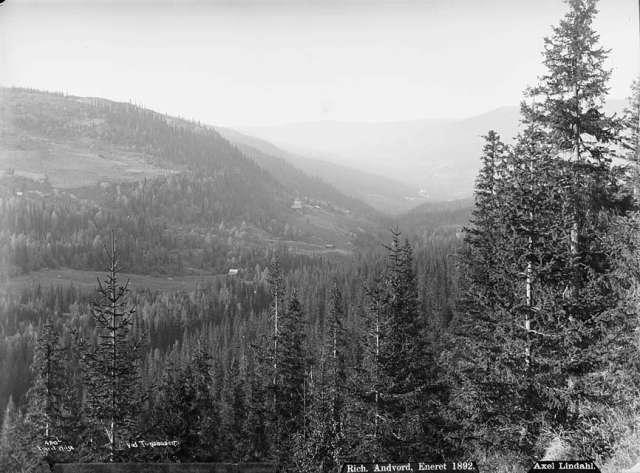 Fra Tonsåsen, Fjellsbygda mot venstre og Nord-Etnedal rett frem, Bruflat ligger nedrst i den skarpe dalen som skjærer seg ned midt i bildet.